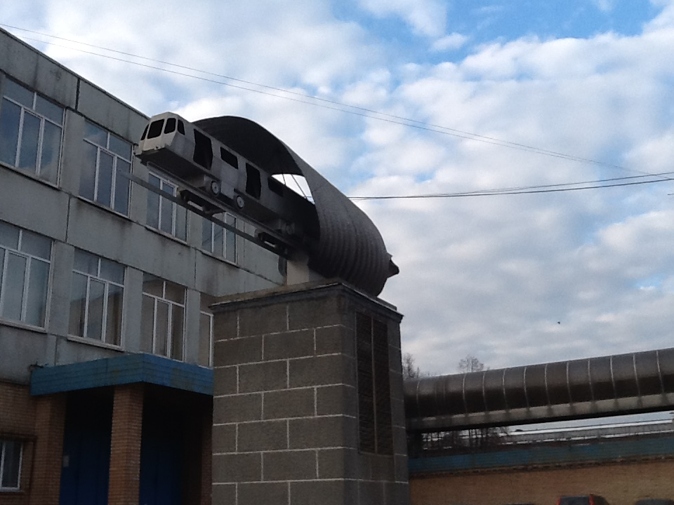 Памятник со стилизованным изображением вагона метро, расположен перед зданием Метровагонмаш (улица Колонцова, город Мытищи, Московская область, Российская Федерация)